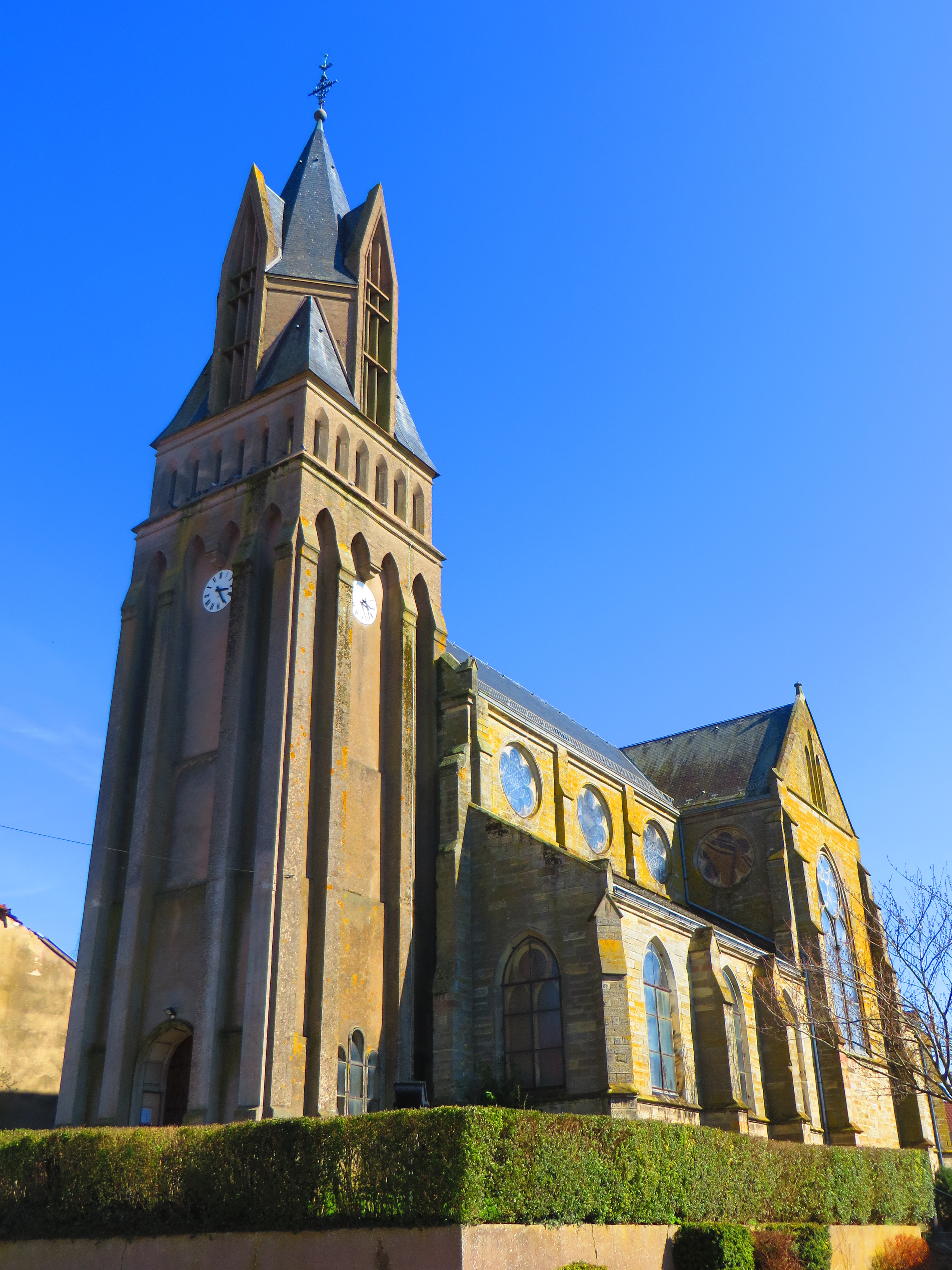 Lelling Église Saint-Étienne